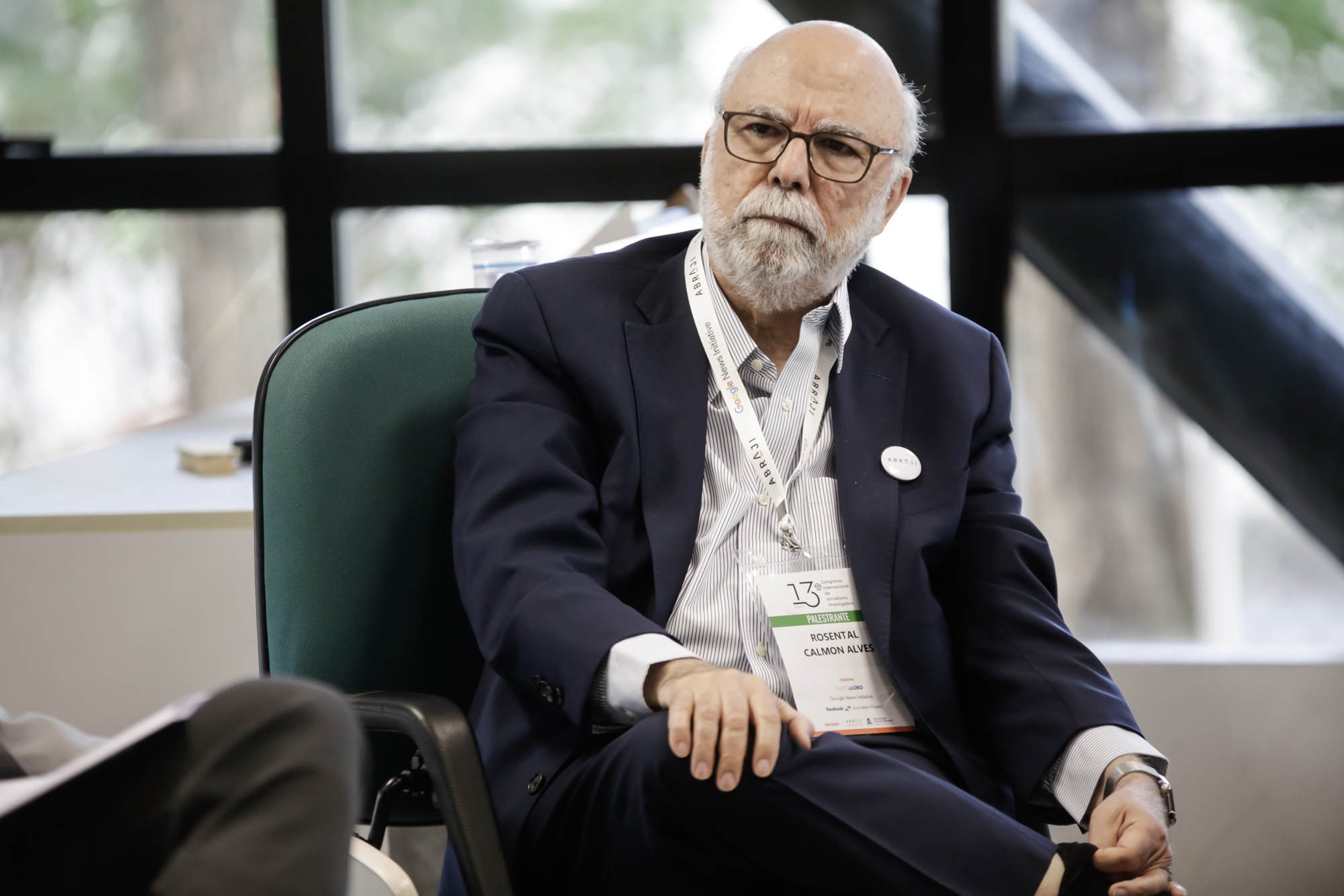 O comando em mutação: diretores de redação na era das transformações Palestrantes: Alan Gripp (O Globo); Daniela Pinheiro (Época); Marcelo Beraba (Estadão/Abraji); Sérgio Dávila (Folha de S.Paulo) Moderação: Rosental Calmon Alves (Centro Knight para o Jornalismo nas Américas) Foto: Alice Vergueiro/Abraji